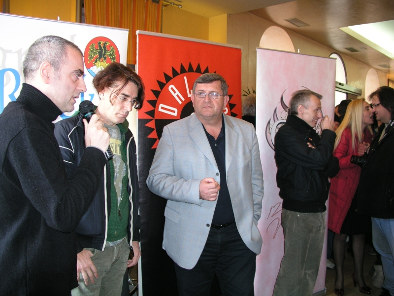 "Riječki novi val" u Kontu, Rijeka, Hrvatska